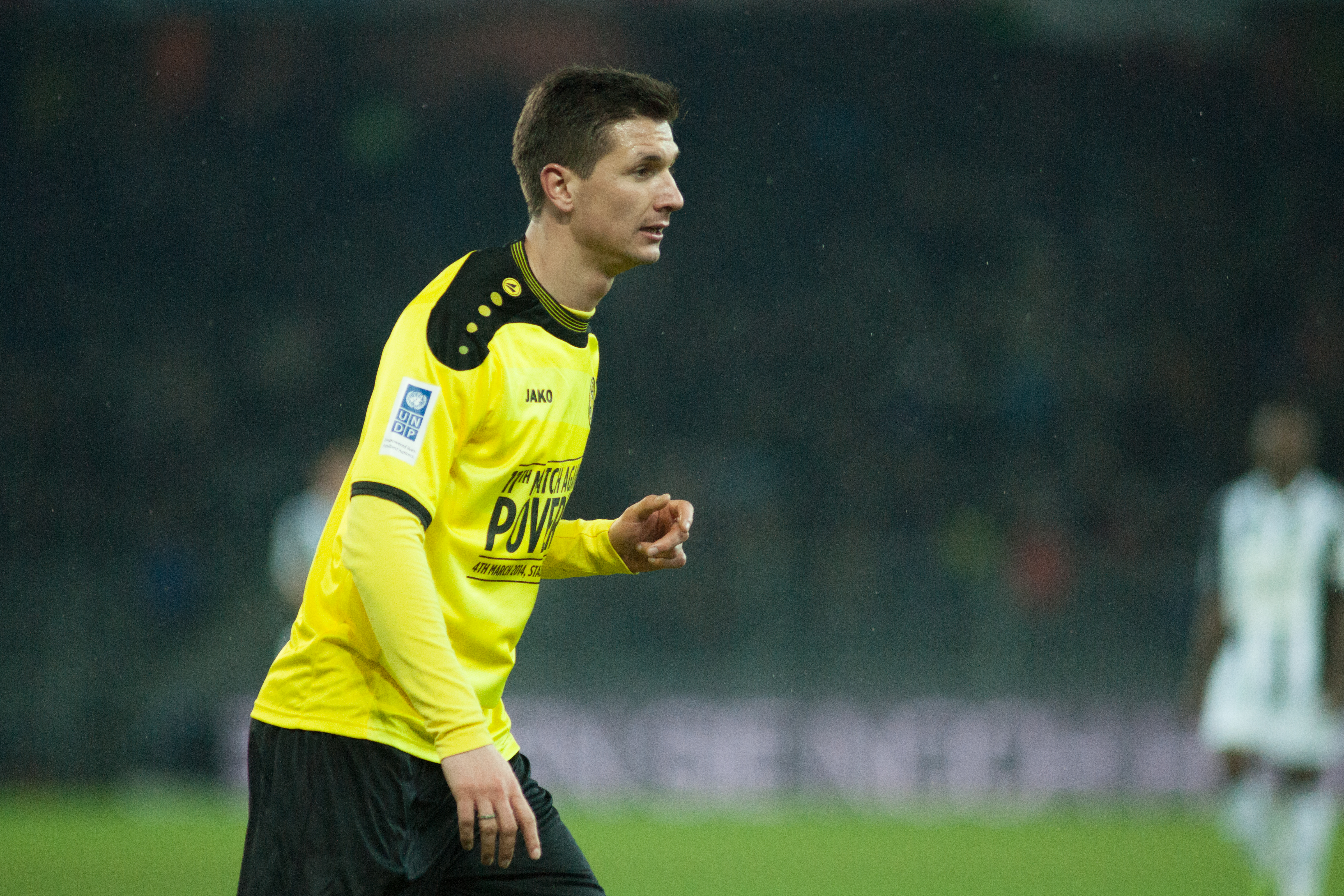 Football against poverty 2014 - Milan Vilotić